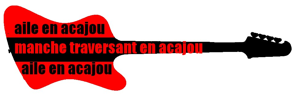 Schéma visant à expliquer la construction d'une guitare basse électrique Thunderbird